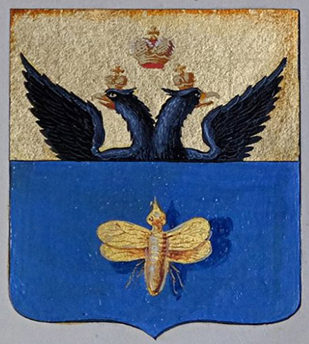 Беларуская (тарашкевіца): Клімавічы (Klimavičy). Герб места